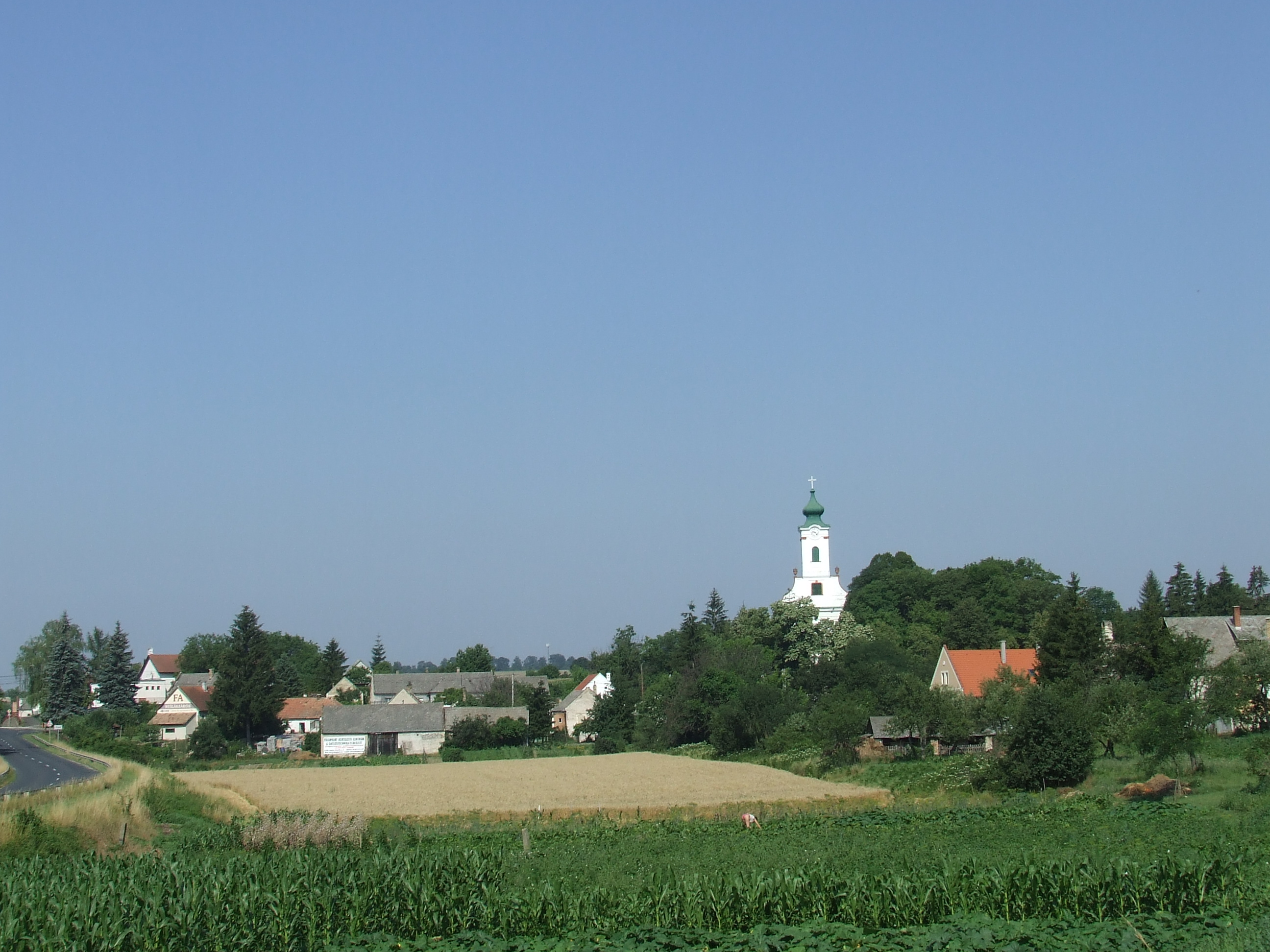 Pula község, Veszprém megye